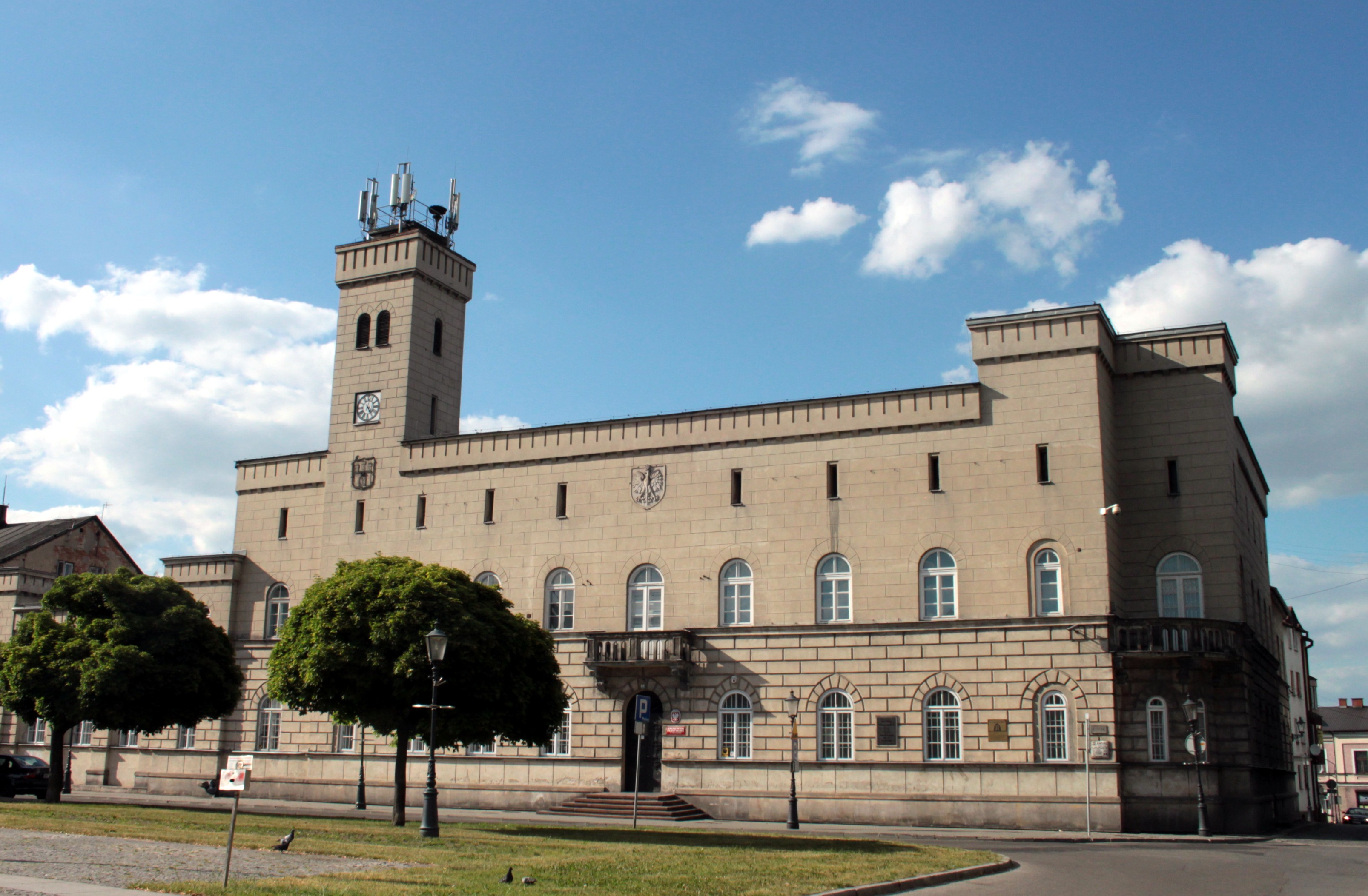 Ratusz w Radomiu